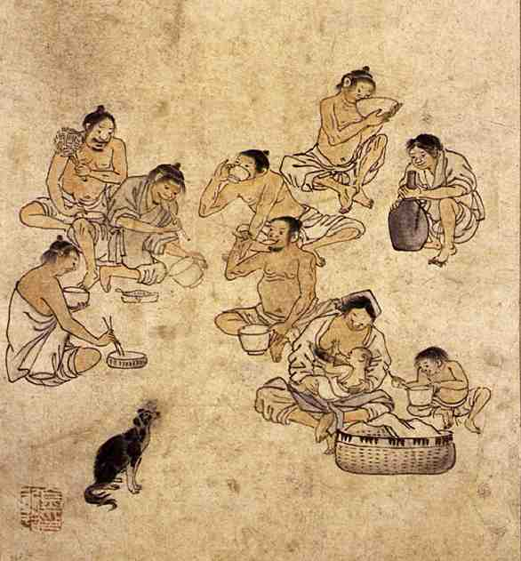 점심, 단원풍속도첩(檀園風俗畵帖)에서 종이에담채, 27cm x 22.7cm, 국립 중앙박물관 소장